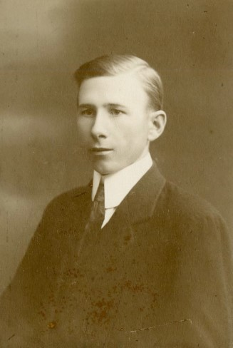 Clas Ohlson (1895–1979), svensk bedriftsgründer og konstruktør.